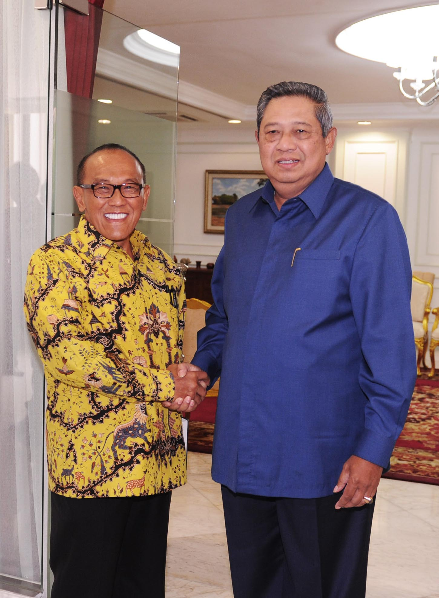 Presiden SBY menerima Ketua Umum Partai Golkar, Aburizal Bakrie di Kantor Presiden, 8 Mei 2013.